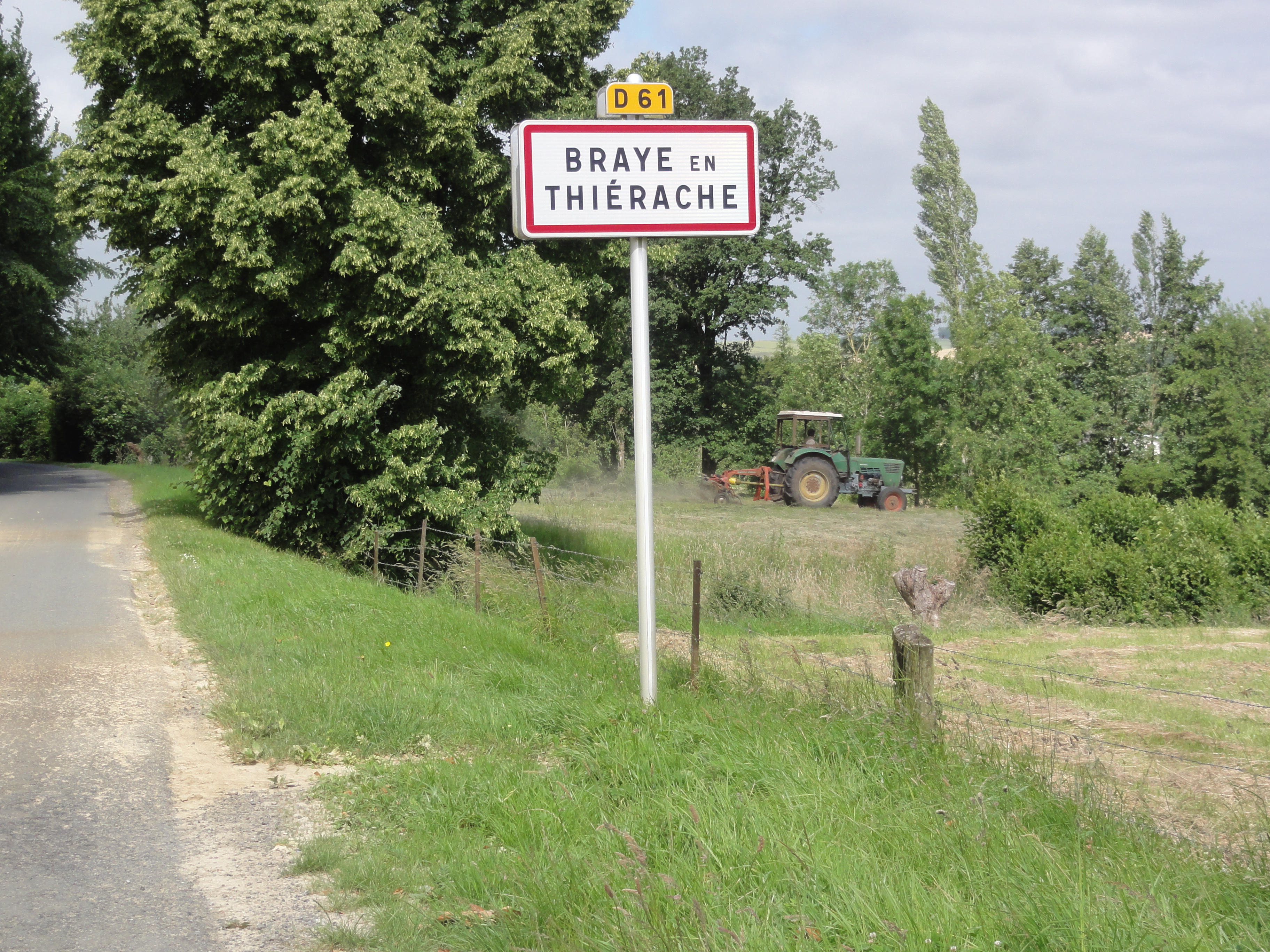 Braye-en-Thiérache (Aisne) city limit sign